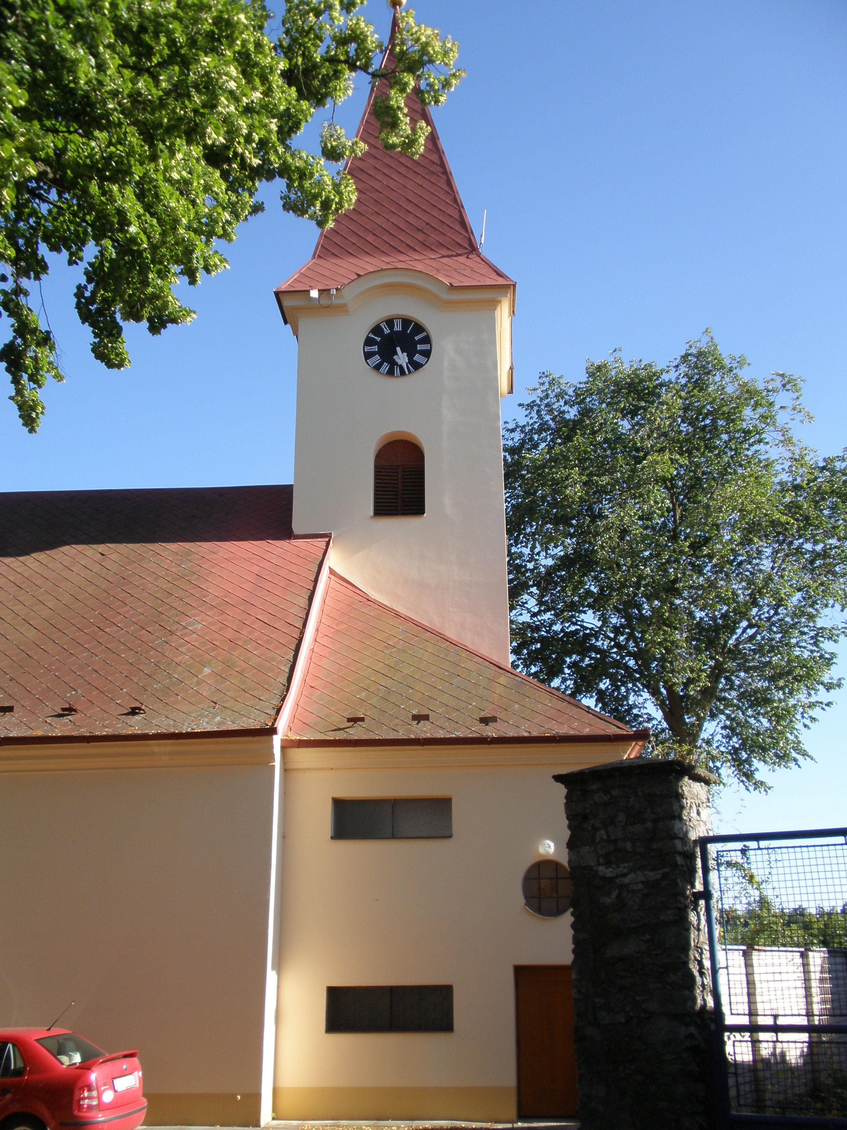 Kostel svaté Maří Magdalény v Ostrově u Macochy